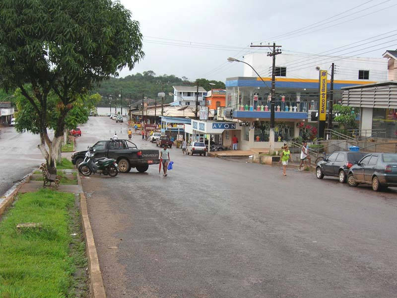 Ville d'Oiapoque (Brésil) En descendant vers les quais. 2005.